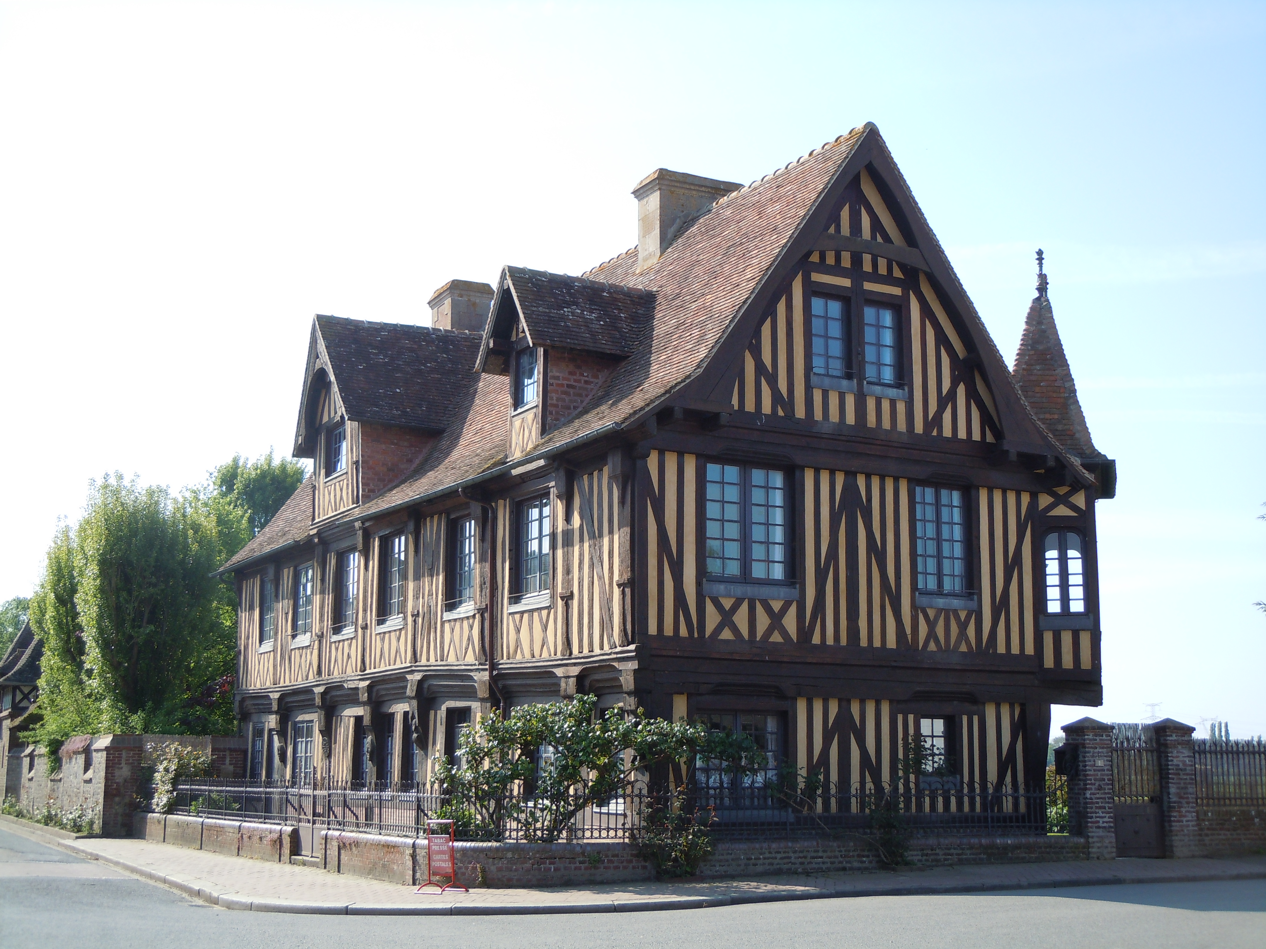 Manoir du XVe siècle à Beuvron-en-Auge (Calvados, France)